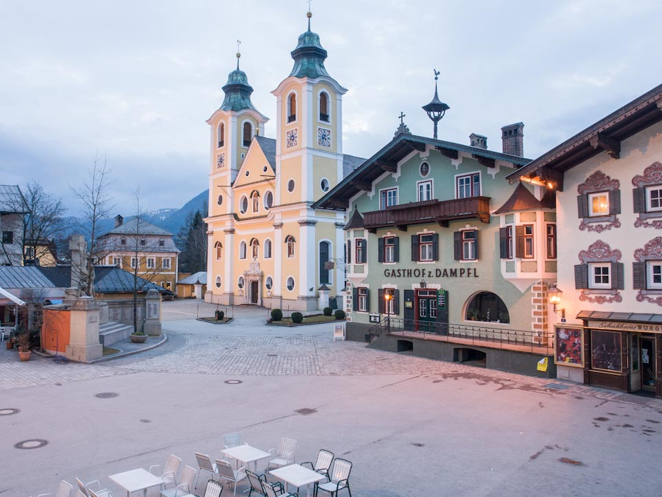 Kath. Pfarrkirche Mariä Himmelfahrt am frühen Morgen